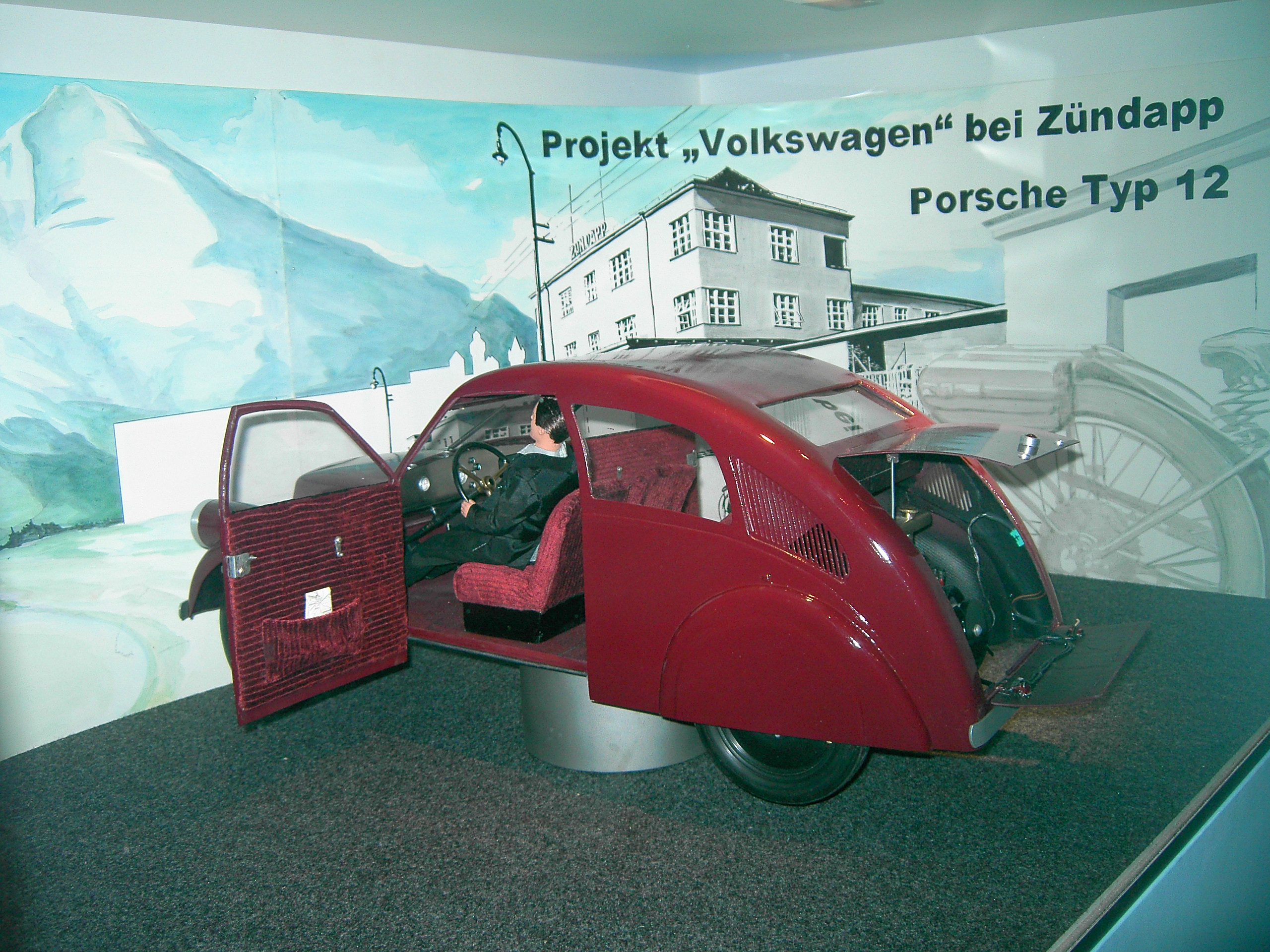 Porsche Model Type 12 (1931/32) Volkswagen made by Zündapp, Nuremburg